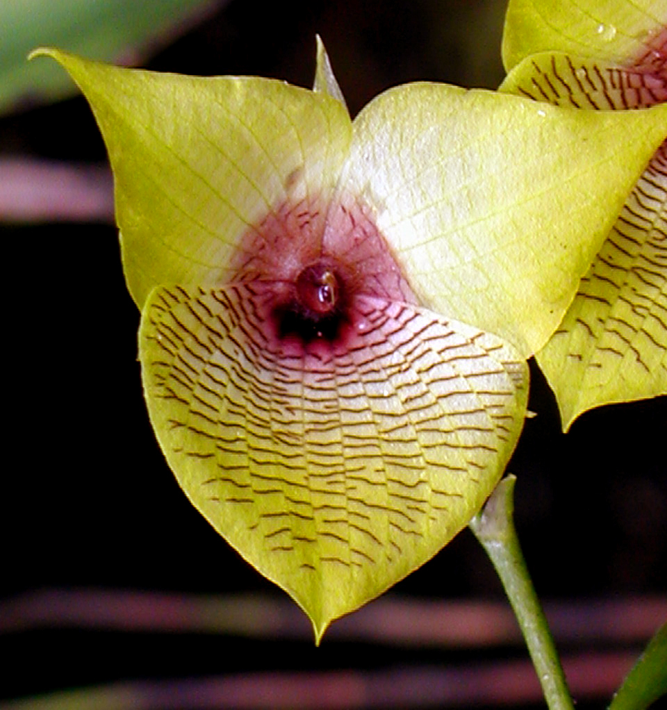 Telipogon bowmanii (syn. Telipogon vargasii)